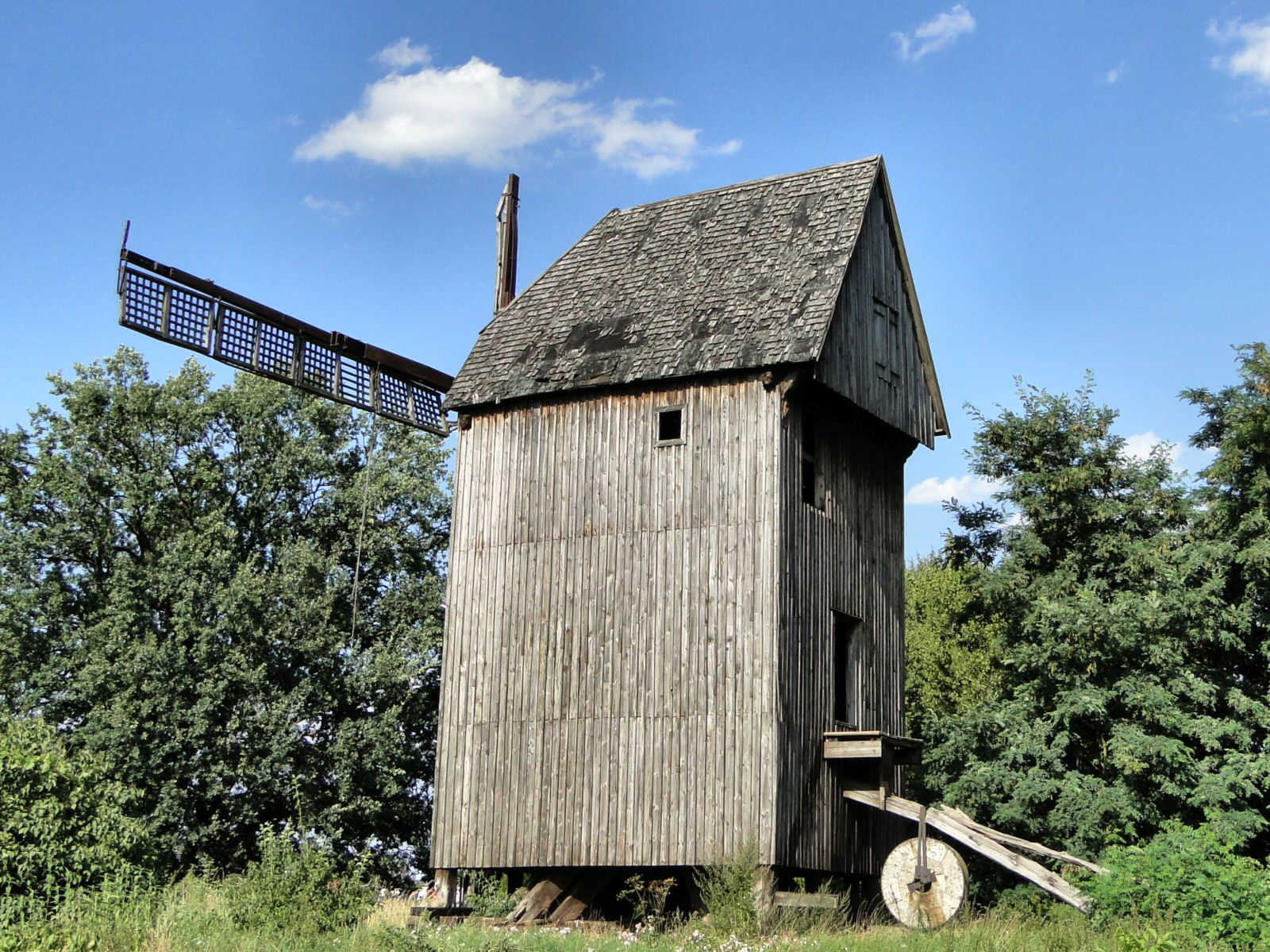 Wiatrak w Mierzynie 12.1965.